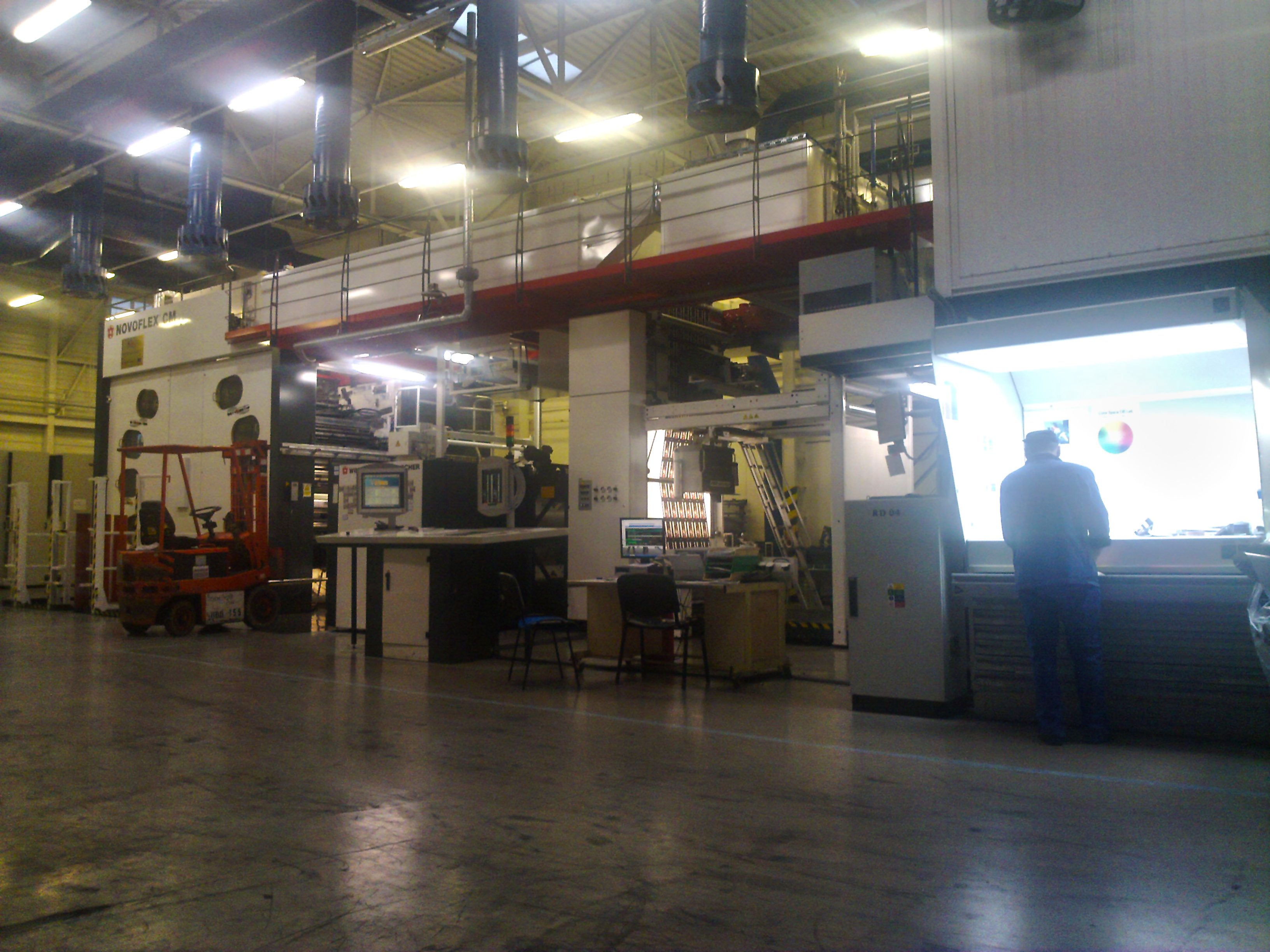 Flexotlačový stroj Novoflex CM od firmy Windmöller & Hölscher v Chemosvite